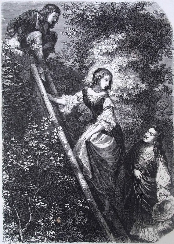 Tajná schůzka slečny Aury de Montalais a Malicorne